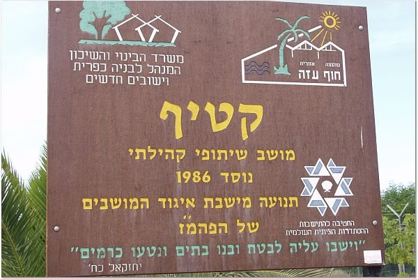 קטיף התמונות באדיבות קטיף.נט (קישור) אתר האינטרנט של גוש קטיף. צילם: מוטי סנדר.